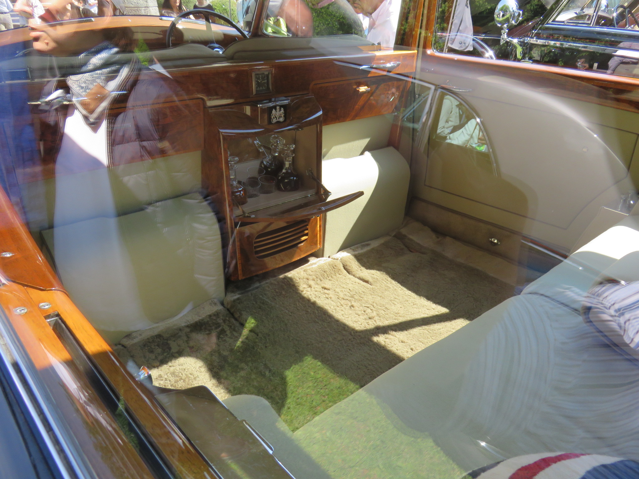 Rolls-Royce Phantom IV de 1954, Limousine 7-places, chassis 4BP7, Princesse Margaret, carrosserie H. J. Mulliner & Co, 8 cylindres 5,6 L, concours d'élégance Villa d'Este 2015